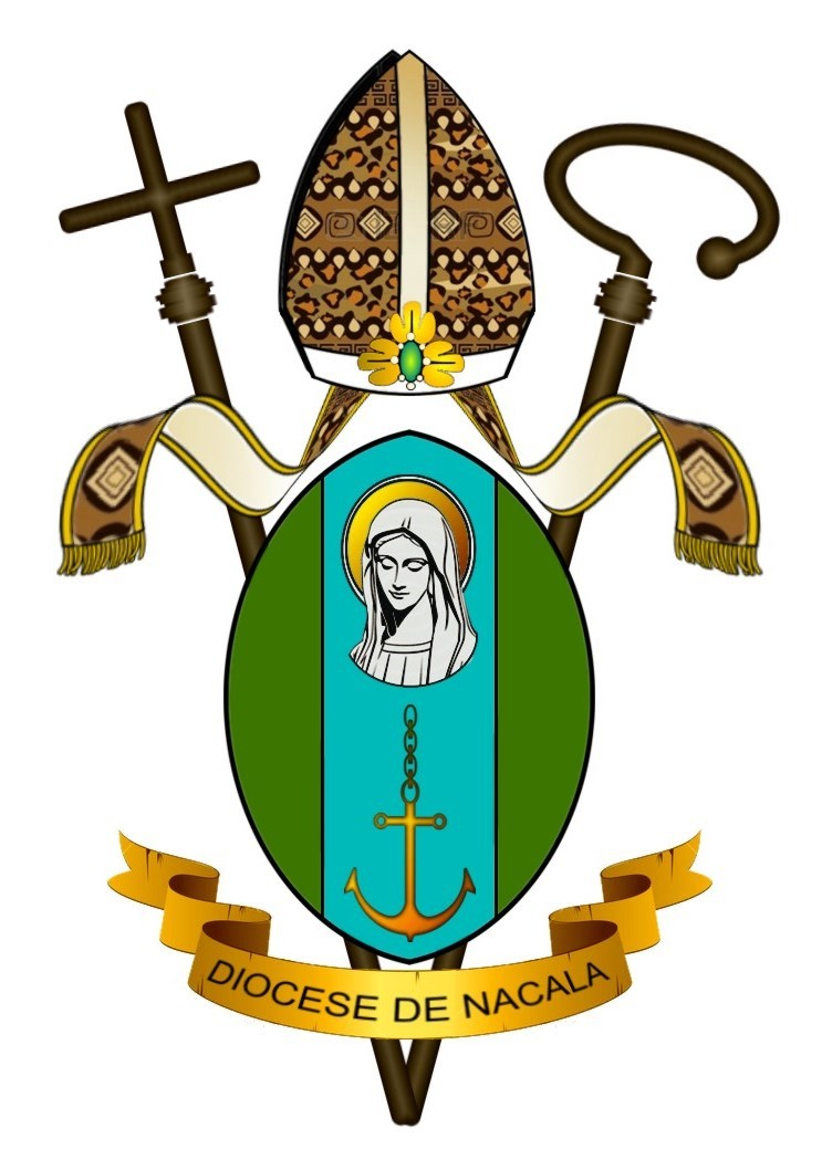 Brasão da diocese de Nacala